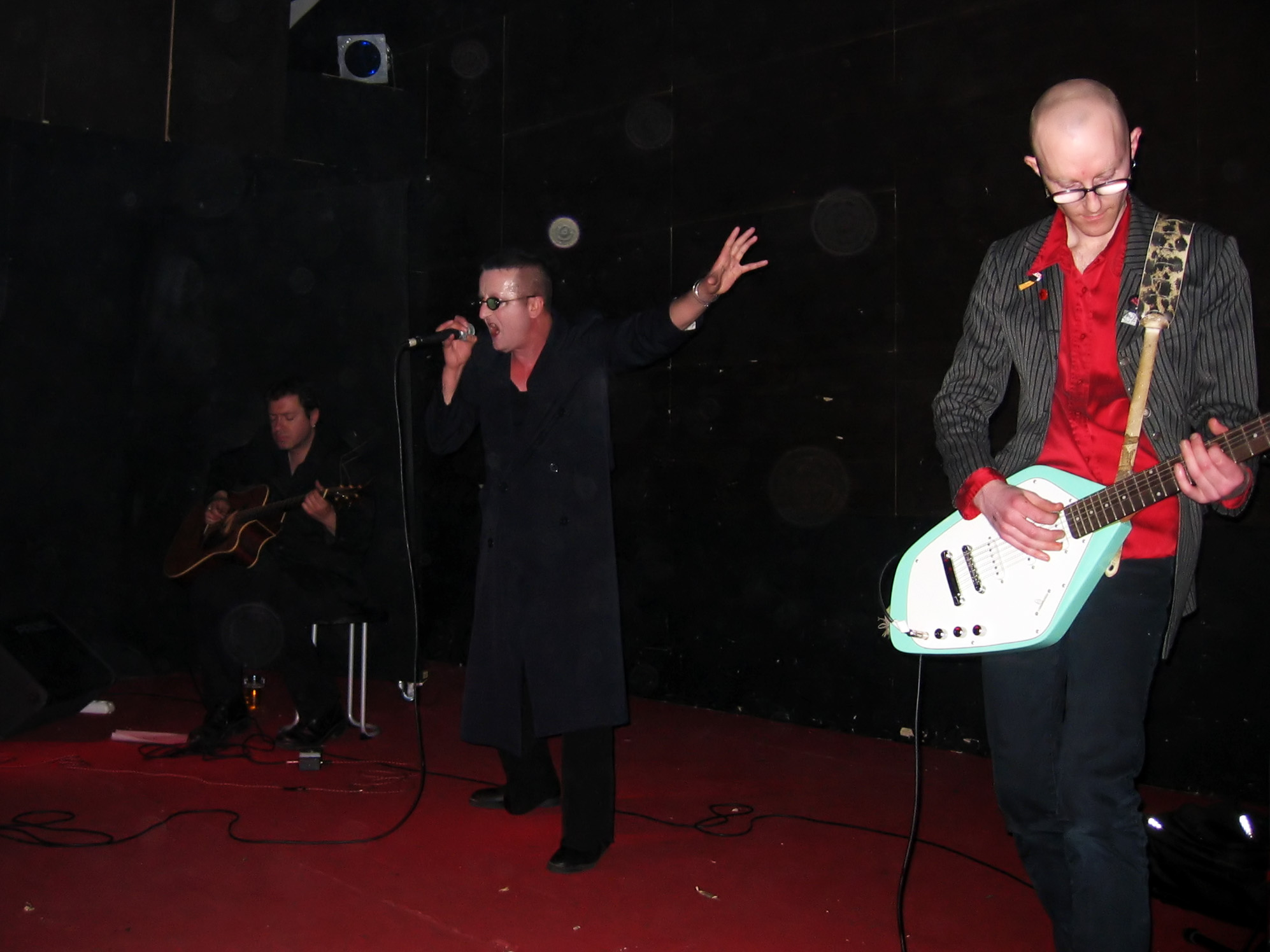 Sex Gang Children, Anomalia Prato